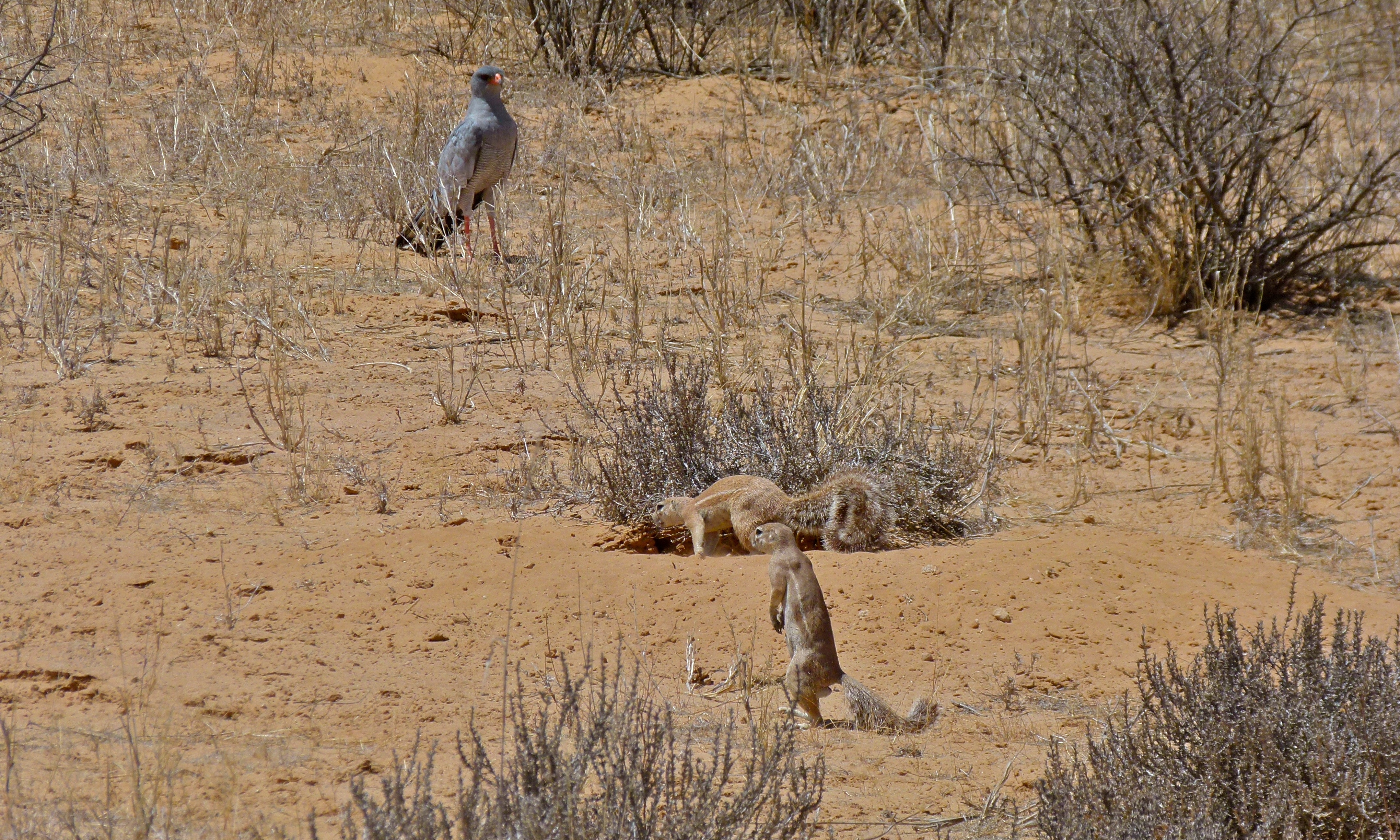 Nossob Riverbed, Kgalagadi Transfrontier Park, SOUTH AFRICA